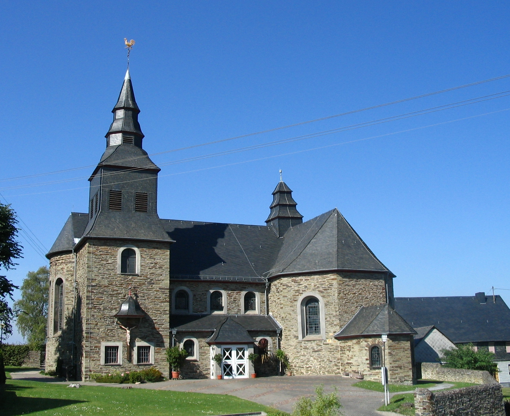 Kirche in Lingerhahn (Hunsrück)